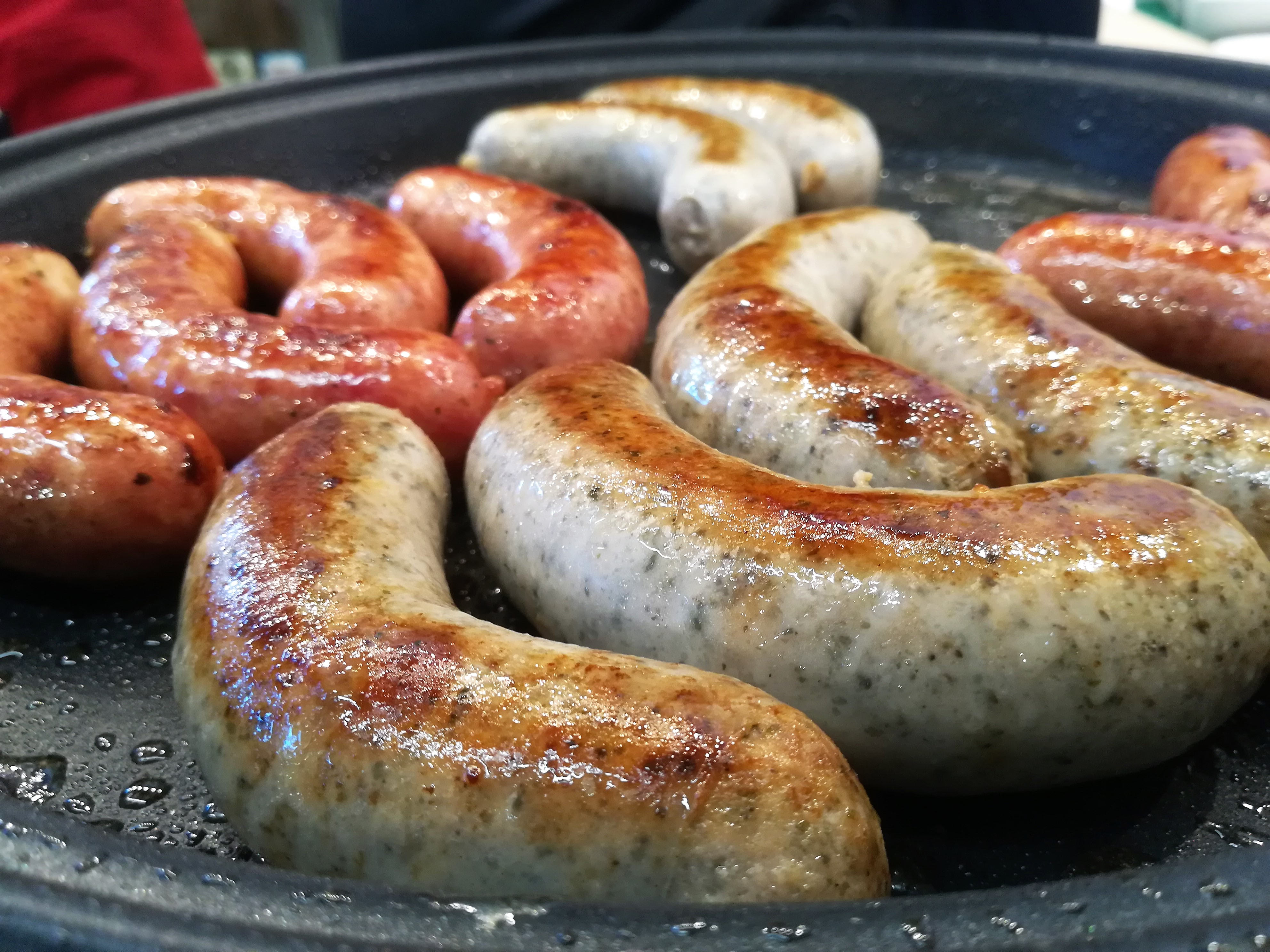 Polska kiełbasa biała na targach Smaki Regionów, Poznań, 2018r.